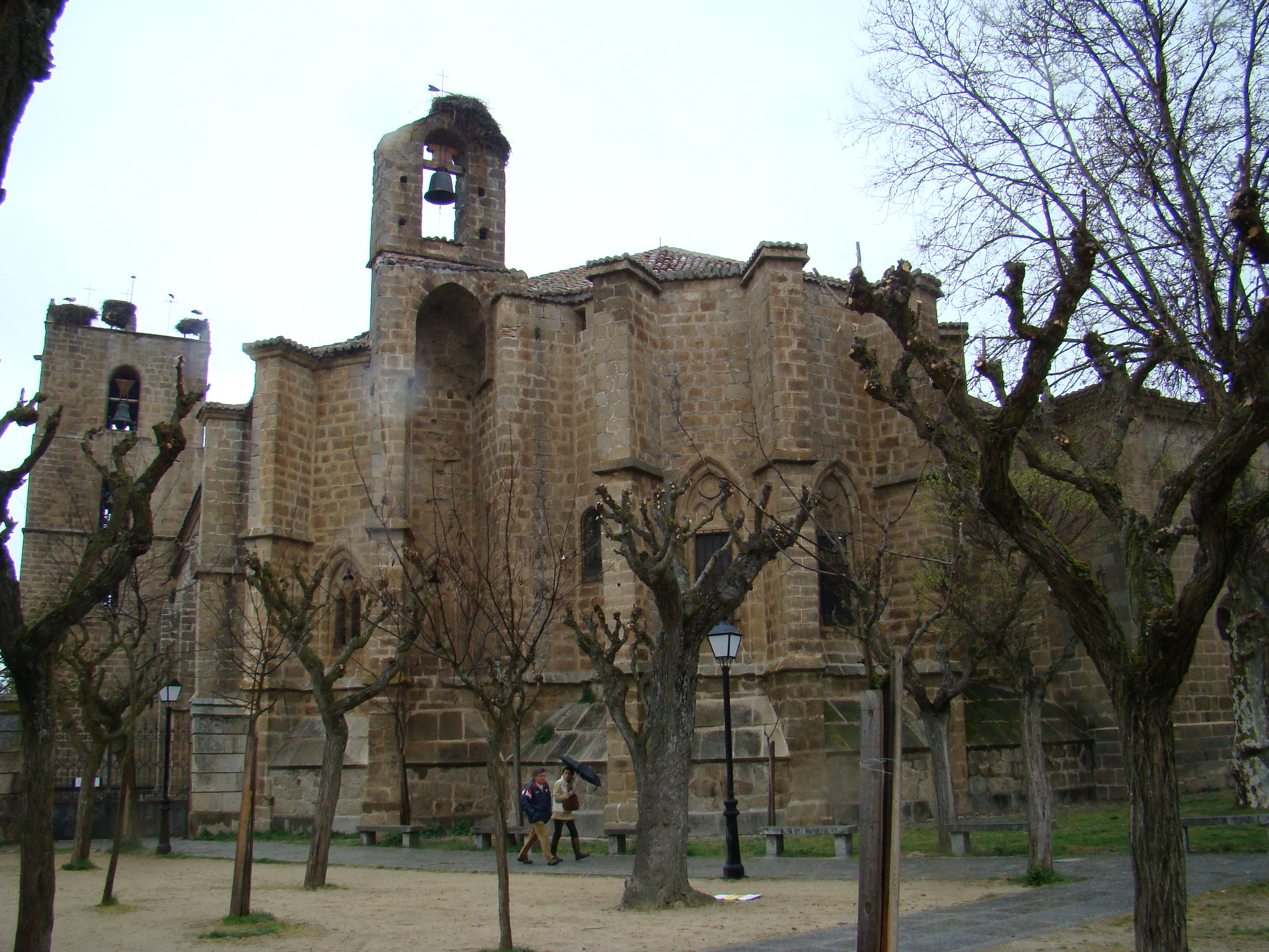 Iglesia de la Asunción en El Barco de Ávila, provincia de Ávila (España)